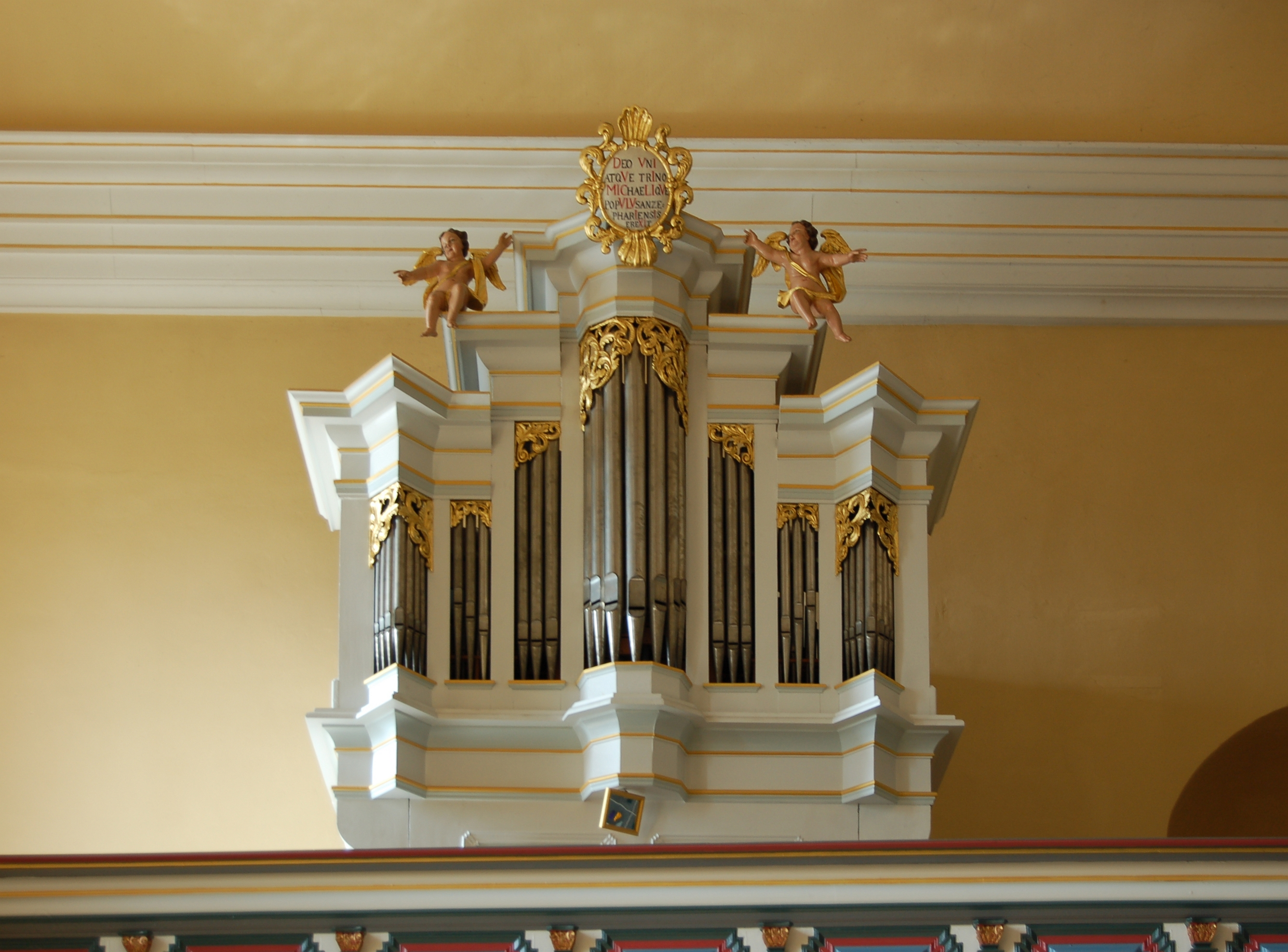 Dieses Foto entstand im Rahmen des Projekts Wiki Loves Monuments Mittelhessen, das aus dem Community-Projektbudget von Wikimedia Deutschland e. V. gefördert wurde.